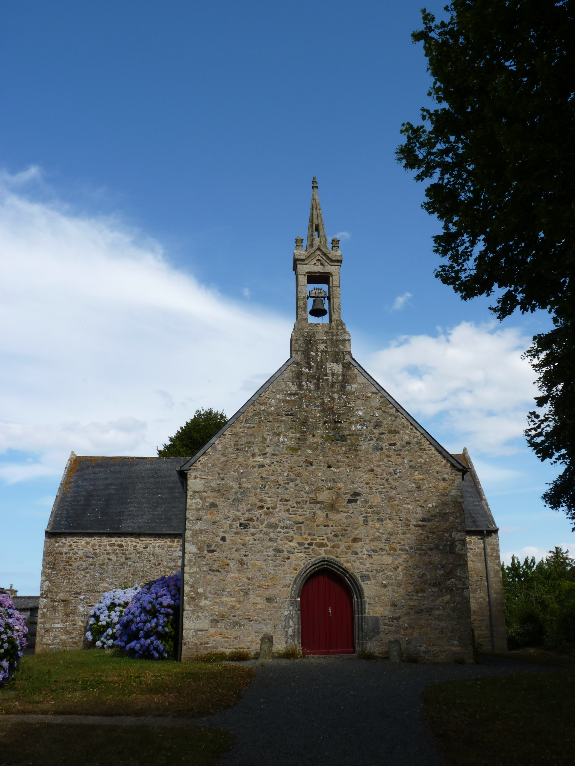 Chapelle du 16ème siècle dans un enclos arboré